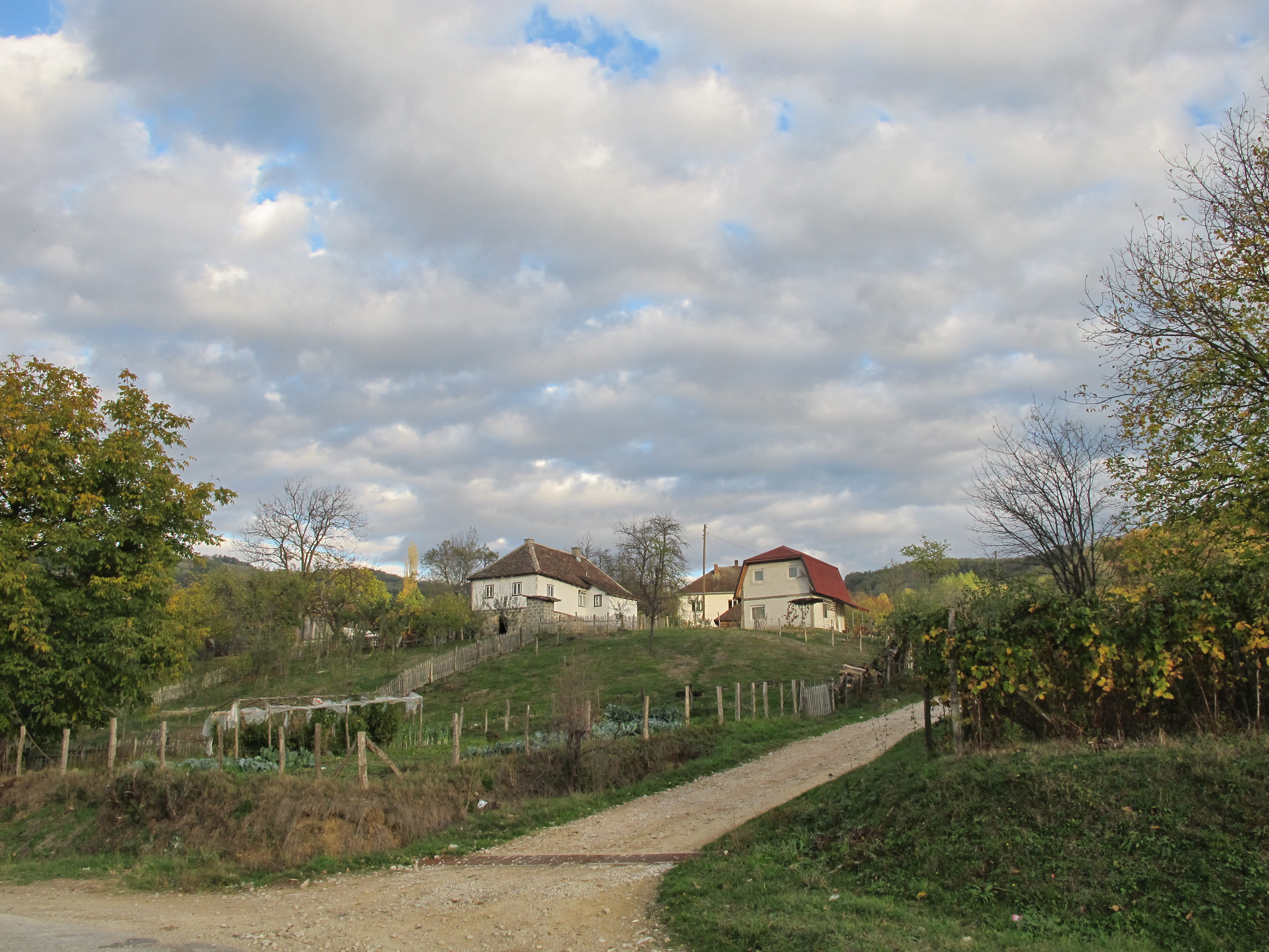 Дрлаче.